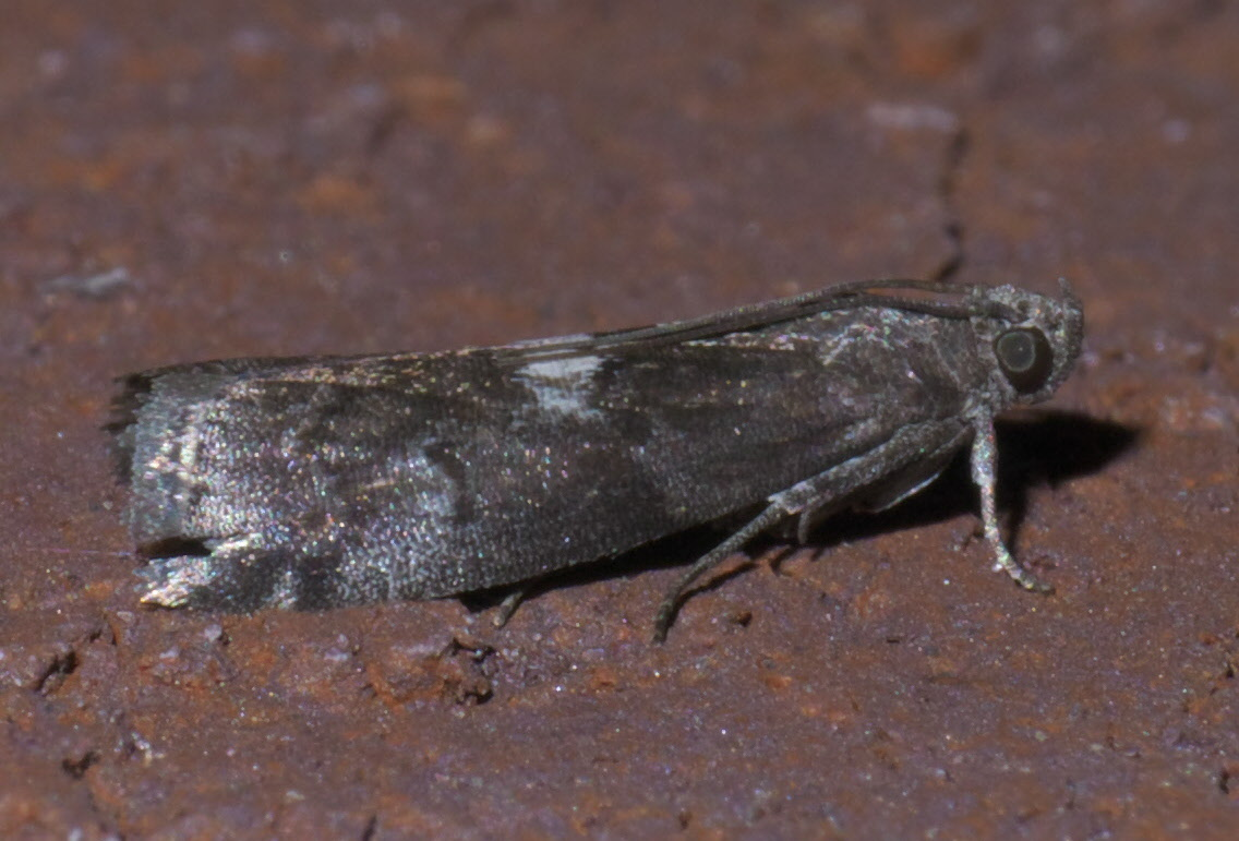 Salebriaria engeli, Engel's Salebriaria - Hodges #5773, ID Confidence: 92